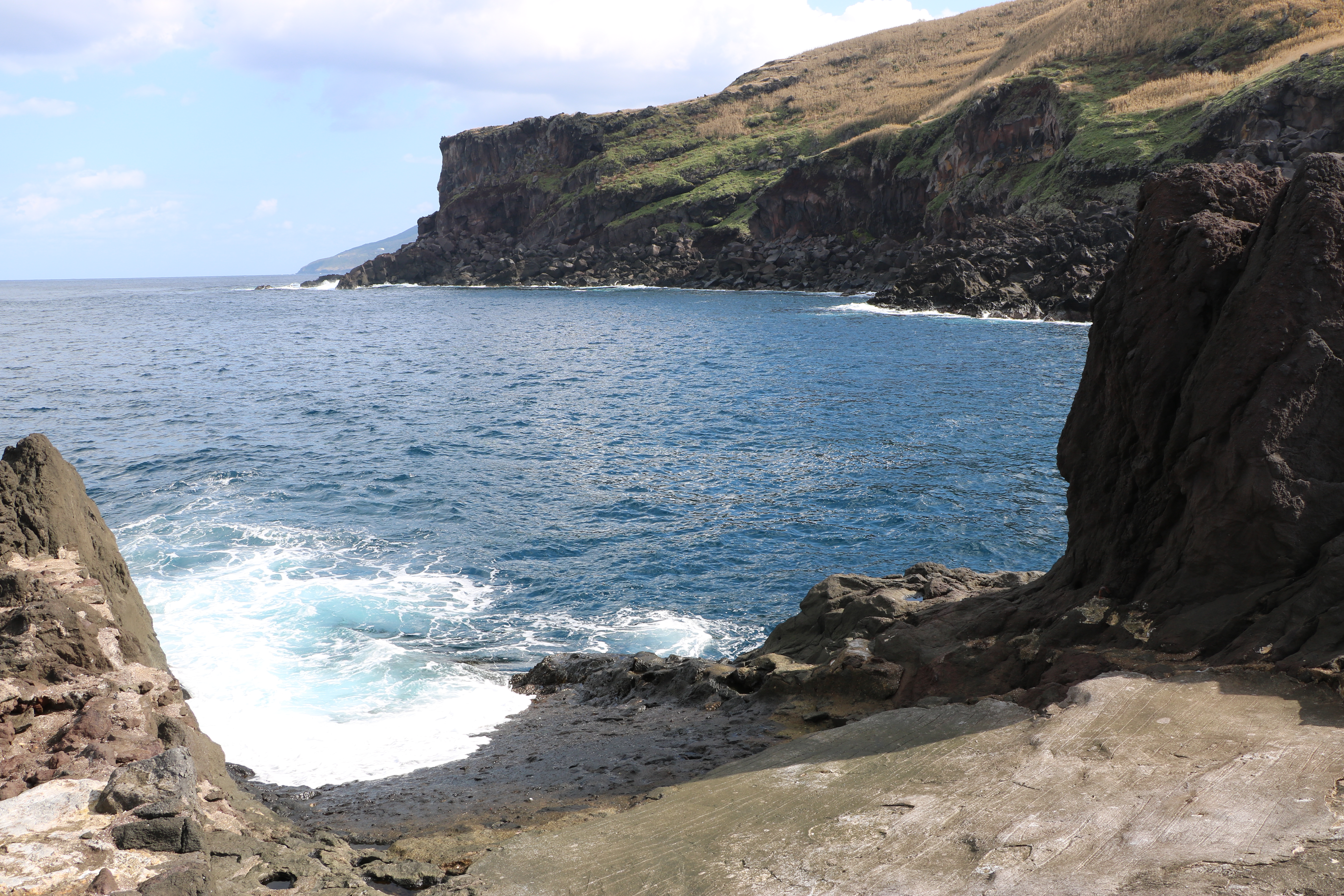 八丈小島鳥打地区船着き場（東京都八丈町）